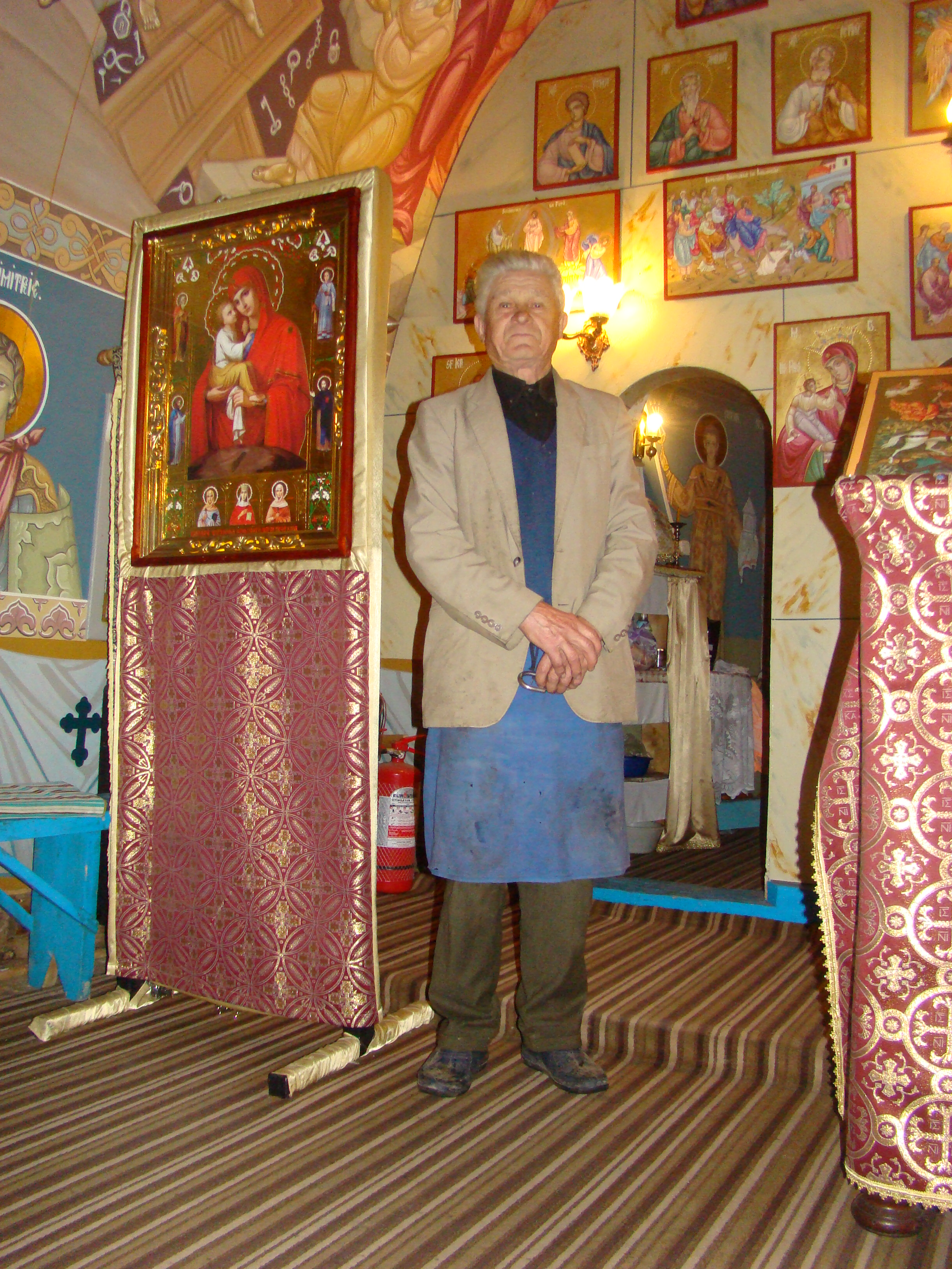 Biserica de lemn „Sf. Teodor Tiron" din Brătești, județul Bihor